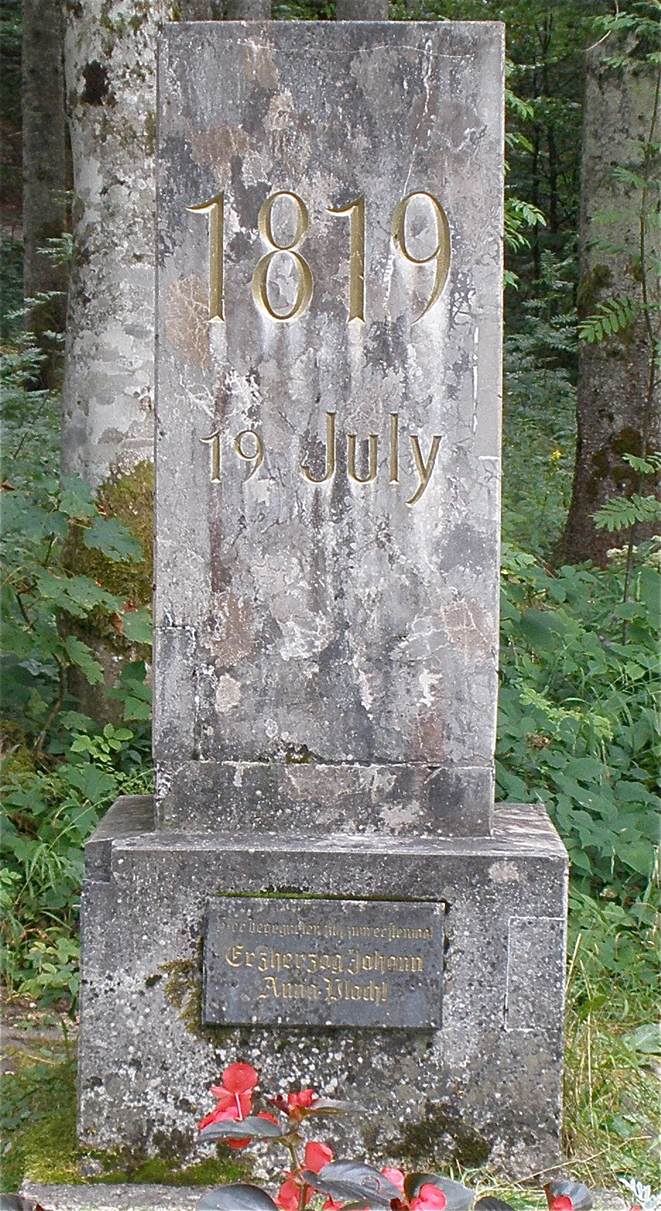 Gedenkstein am Toplitzsee (Gemeinde Grundlsee im Steirischen Salzkammergut) mit der Inschrift: " 1819 19. July Hier begegneten sich zum erstenmal Erzherzog Johann Anna Plochl"